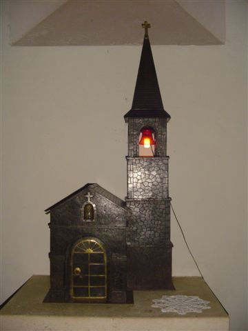 Moulin-Mage (Tarn) - tabernacle de l'église Saint-Hilaire. Ce tabernacle en fer embouti, réalisé par Joseph VIDAL, forgeron à La Trivalle, reproduit le clocher et le porche de l'église Saint-Hilaire.